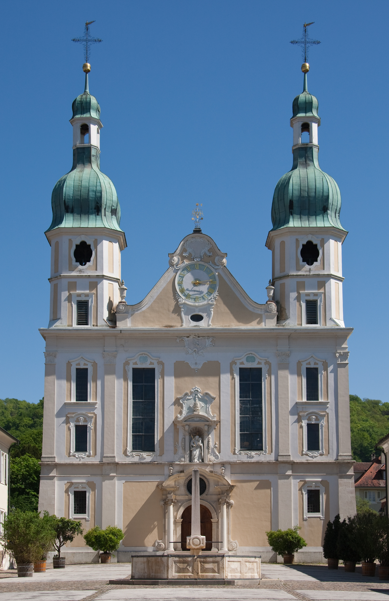 Dom in Arlesheim